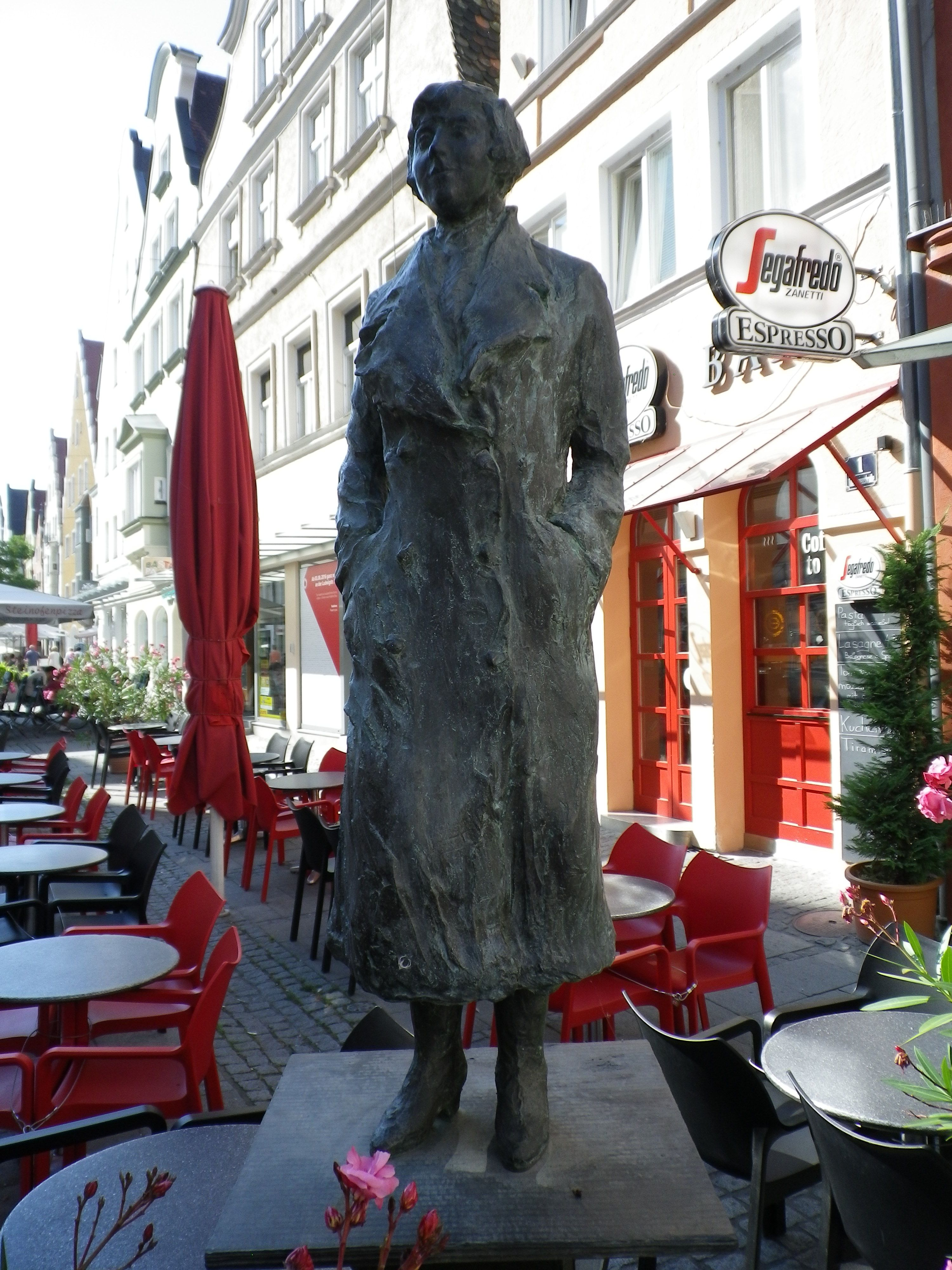 Statue von Marieluise Fleißer